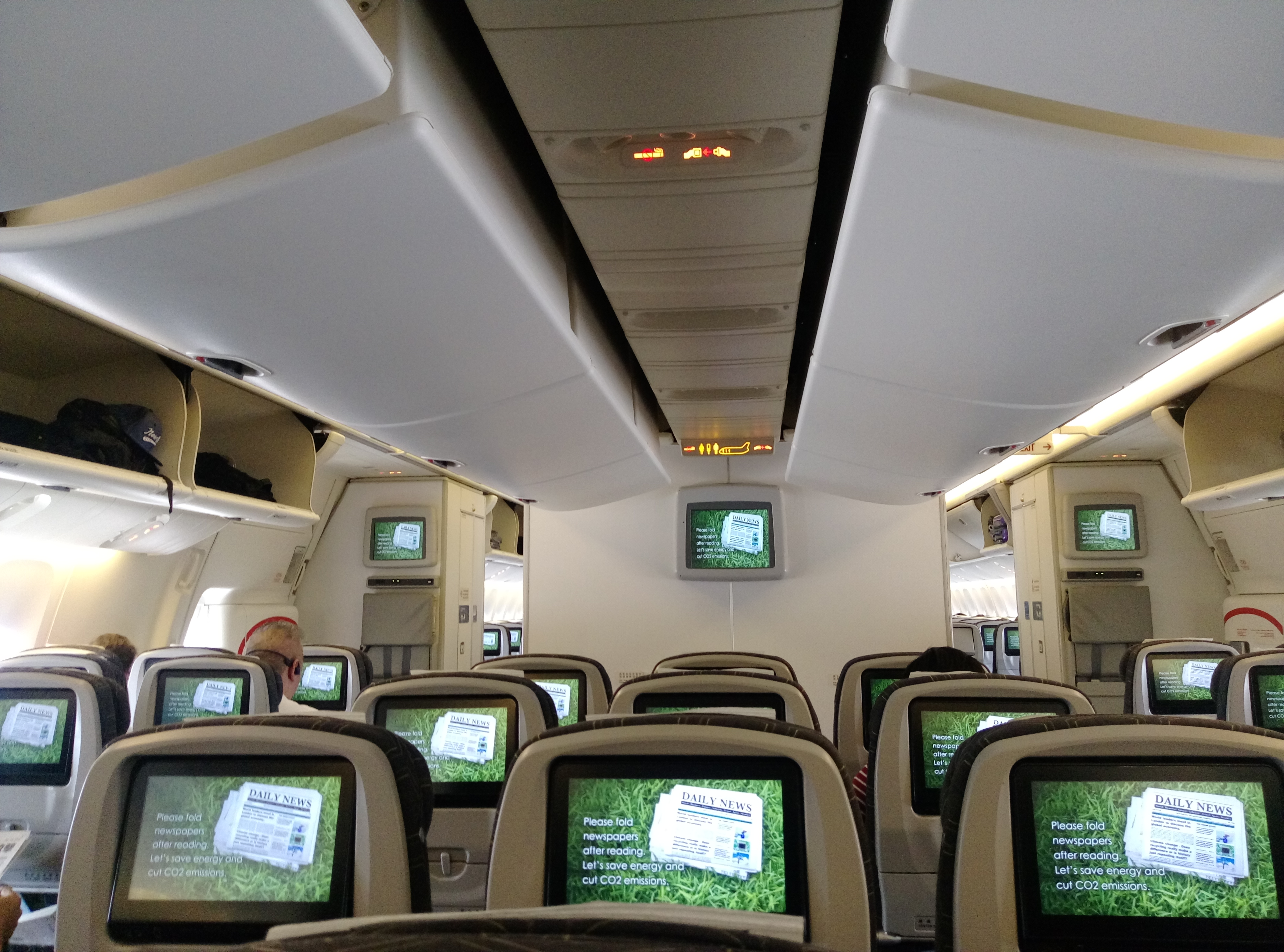 長榮航空波音777客機內部。